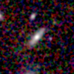 Galaxy NGC 5177